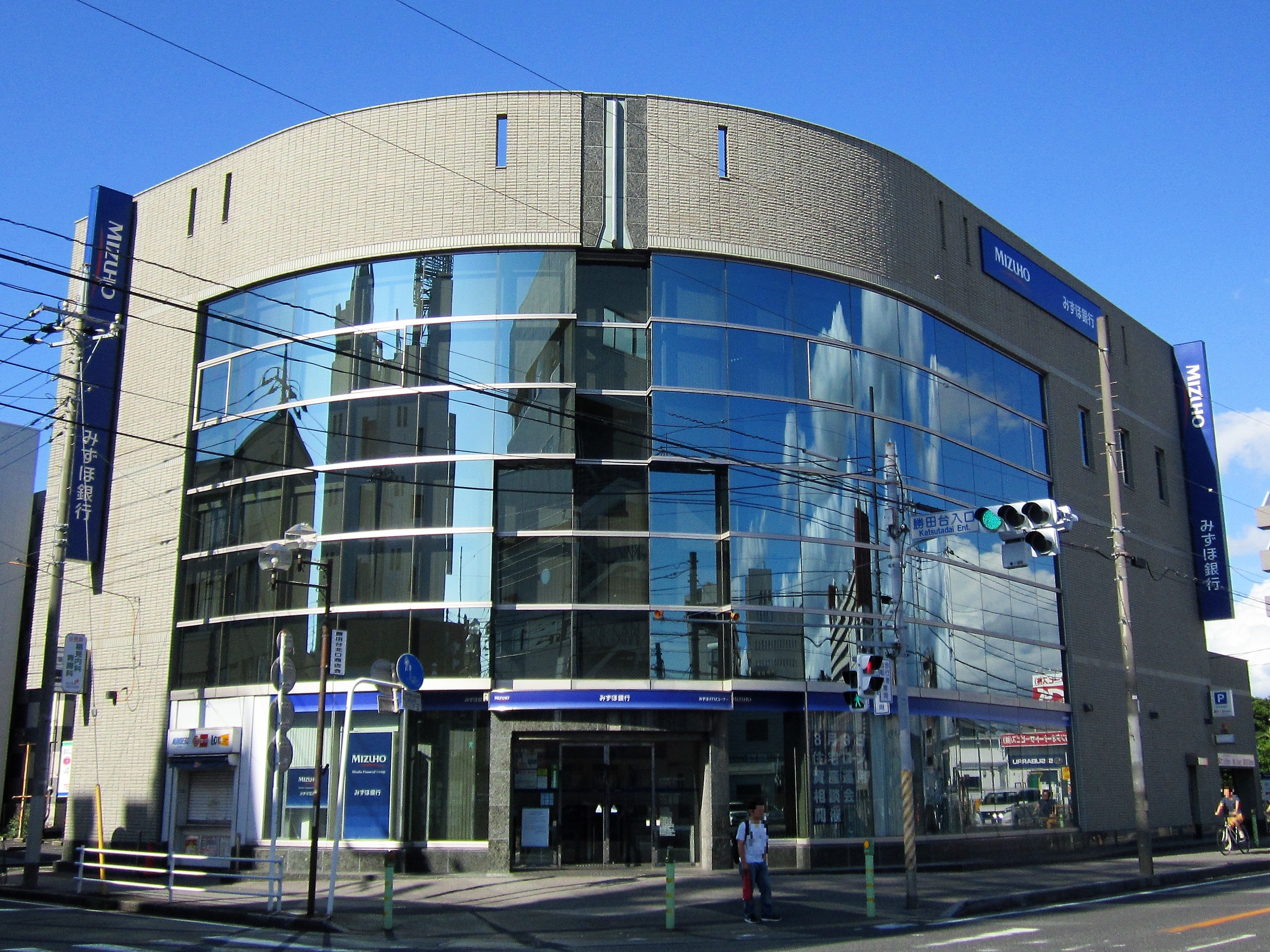 みずほ銀行勝田台支店（八千代市勝田台北）